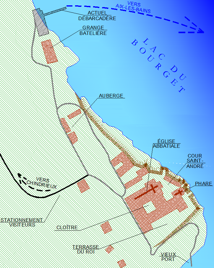 Carte de l'abbaye d'Hautecombe réalisée à partir de photographies aériennes.